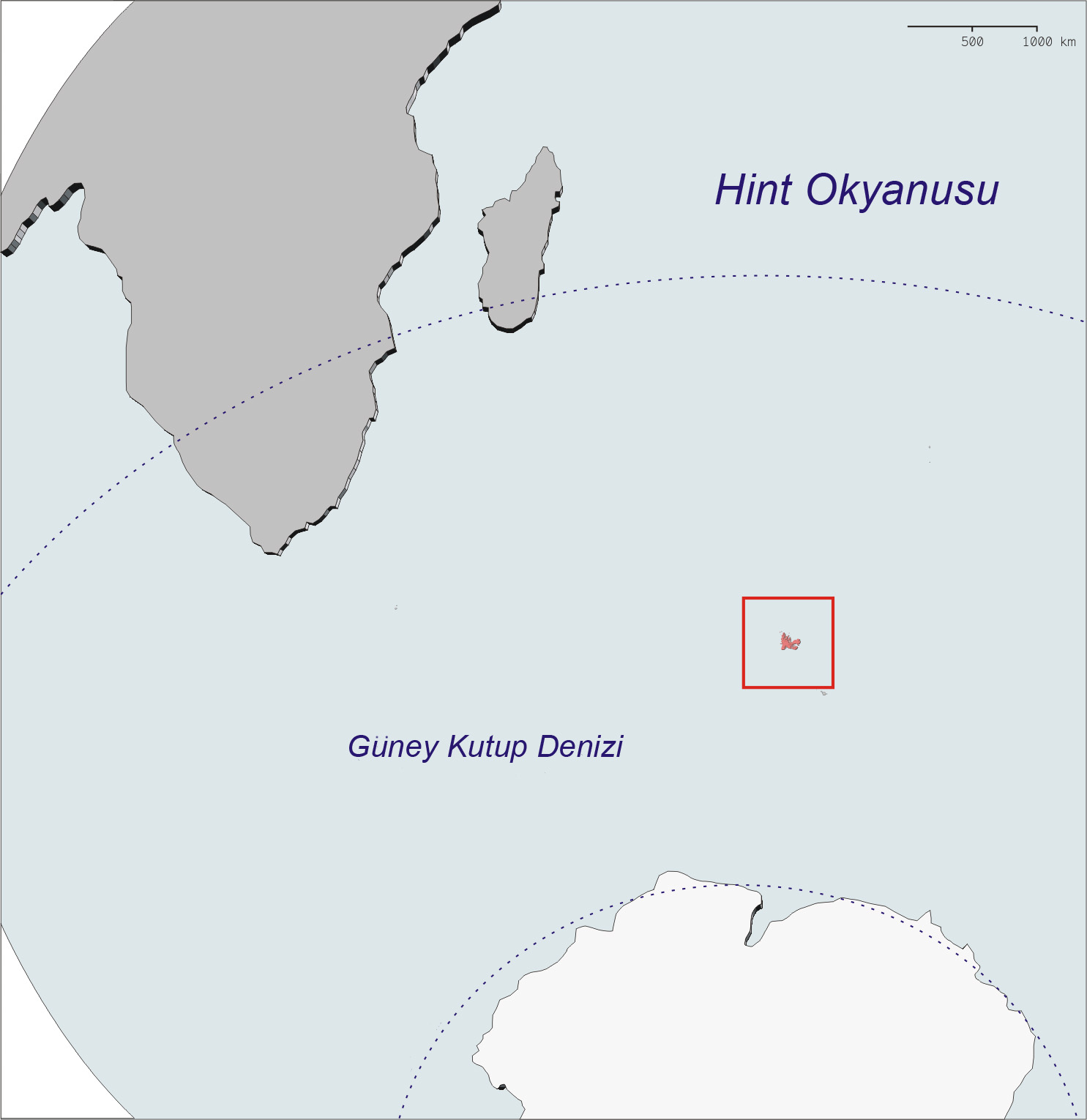 Kerguelen Adalarının bulunduğu konum